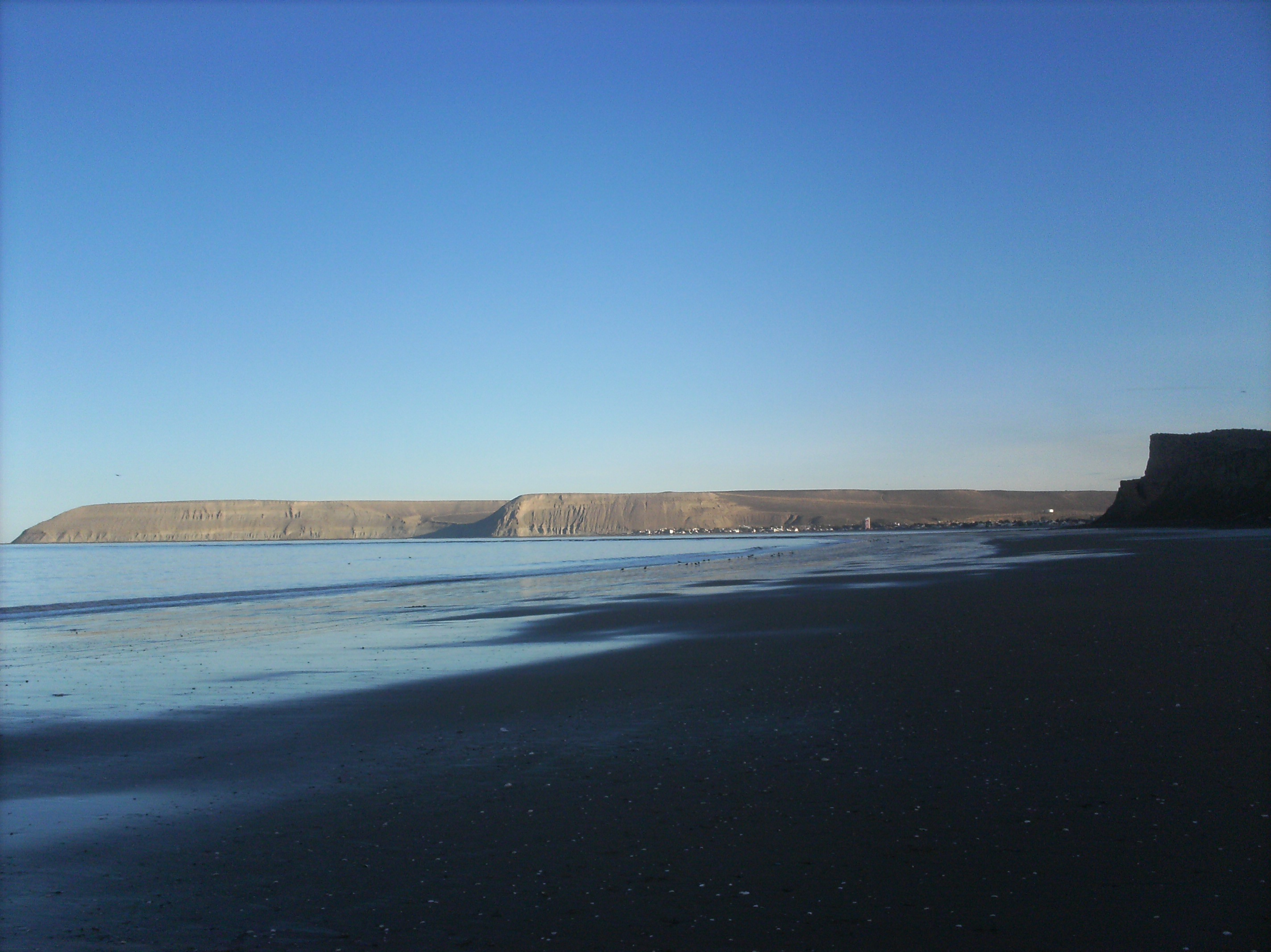 los accidentes geograficos q encierran la villa